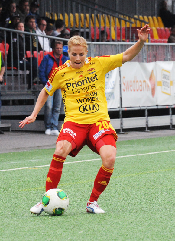 a_103_4172